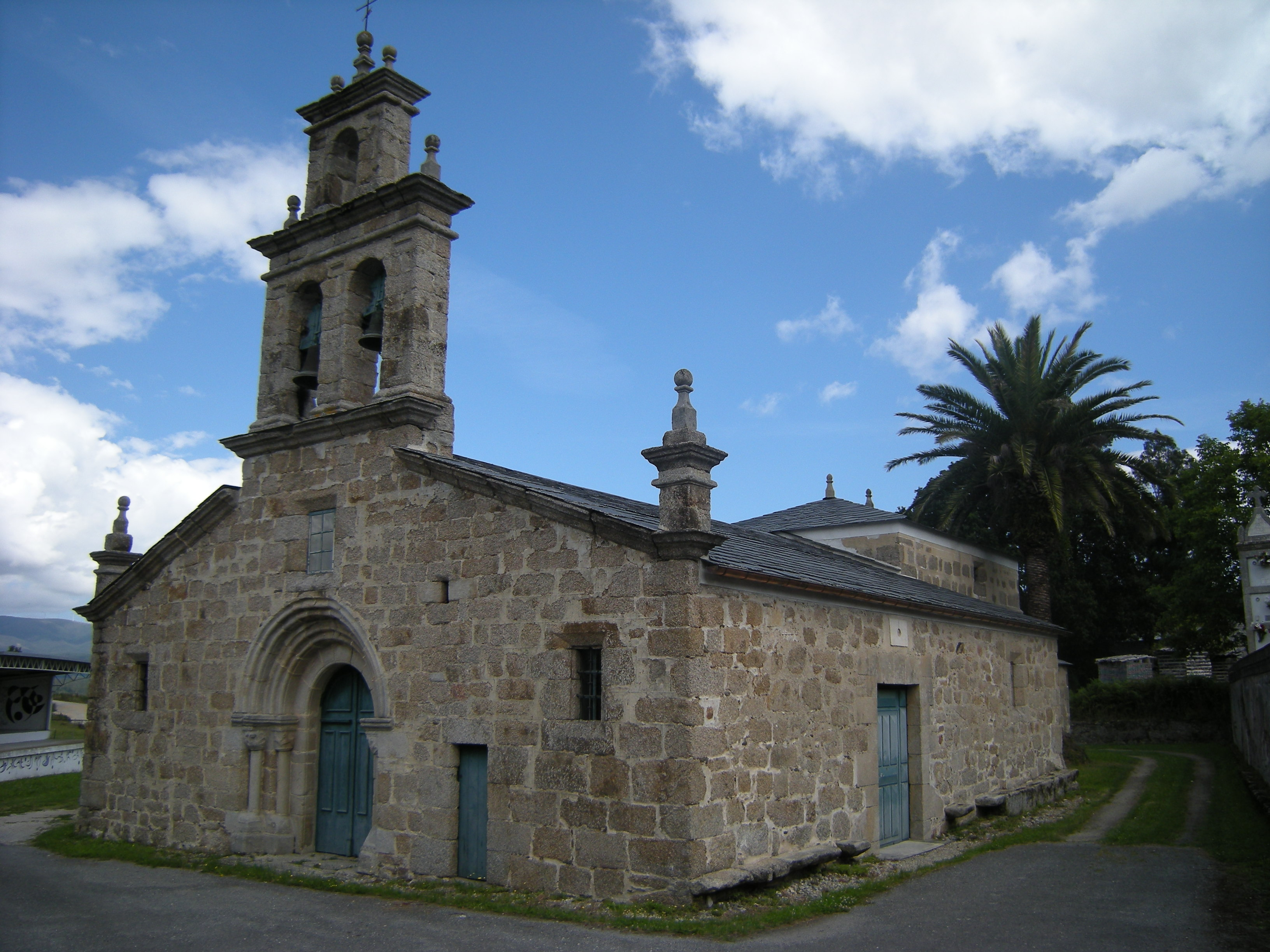 Igrexa de Santiago de Adelán, Alfoz